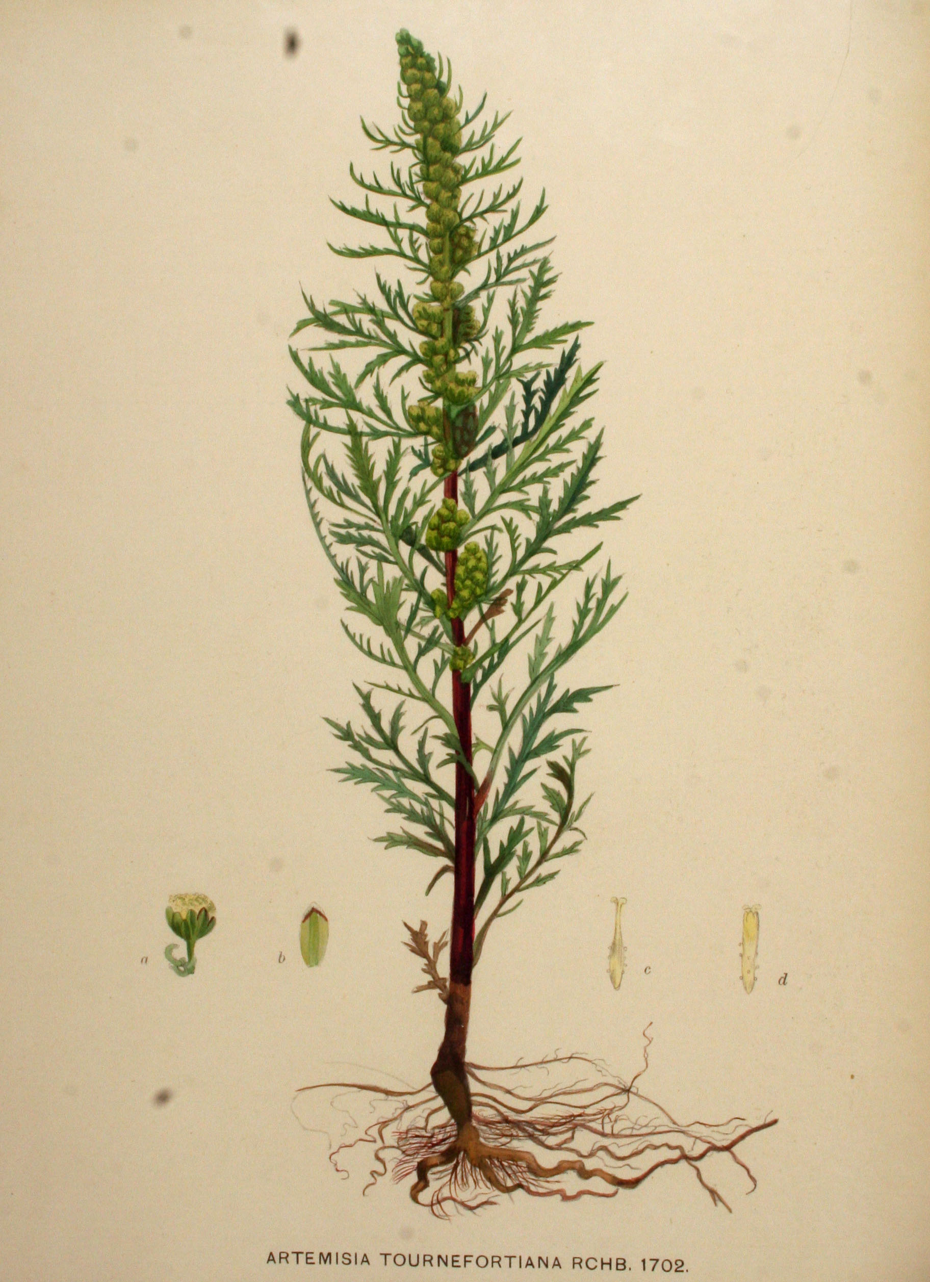 Legende: Ganze Pflanze. a Körbchen. b Hüllblatt. c Äußere weibliche Röhrenblüte. d Innere zwittrige Röhrenblüte.